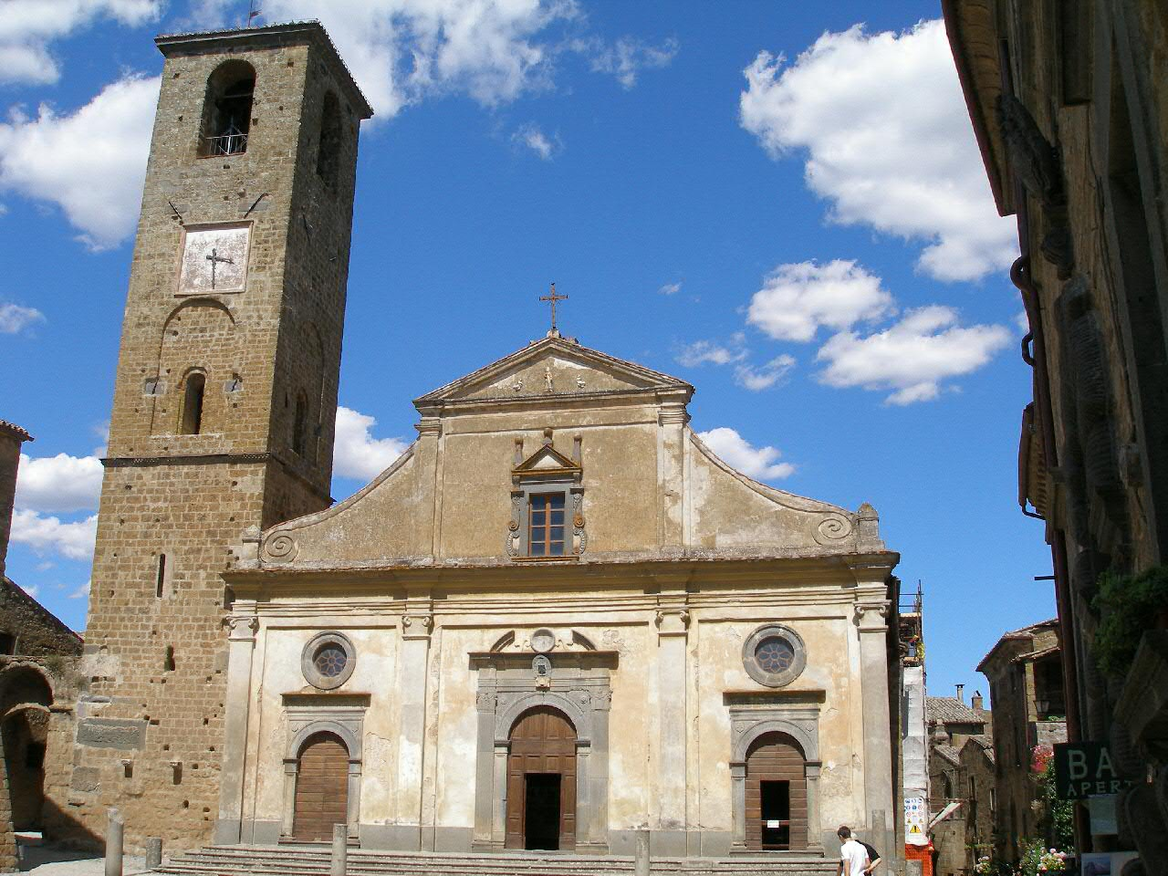 Chiesa di Civita di Bagnoregio.